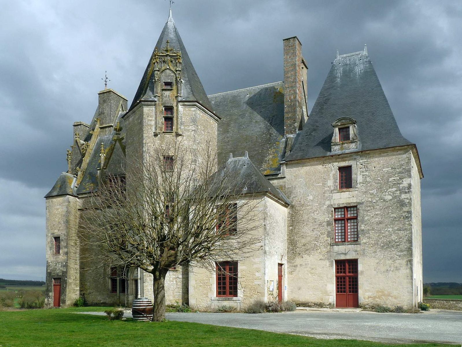 château de Neuvicq-le-Château, Charente-Maritime, France